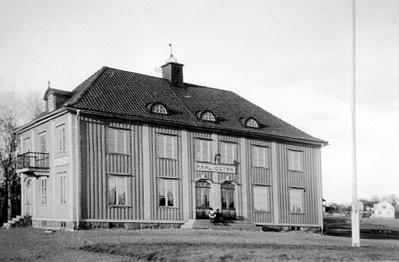 Åmål Östra station vid Åmål–Årjängs Järnväg. Byggnadsår 1929. Arkitekt Carl Axel Hagelberg. (bild något skevad)